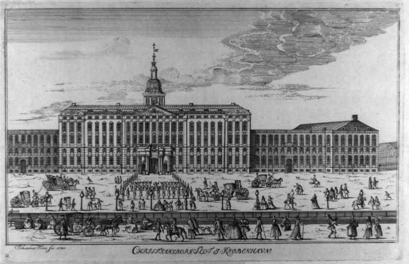 Christiansborg Slot i Kiøbenhavn